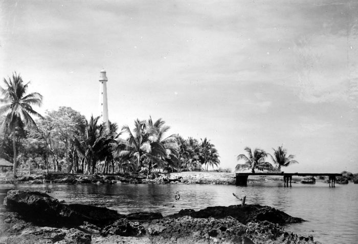 Repronegatief. Vuurtoren bij Anjer-Kidoel, ofwel Java's vierde punt